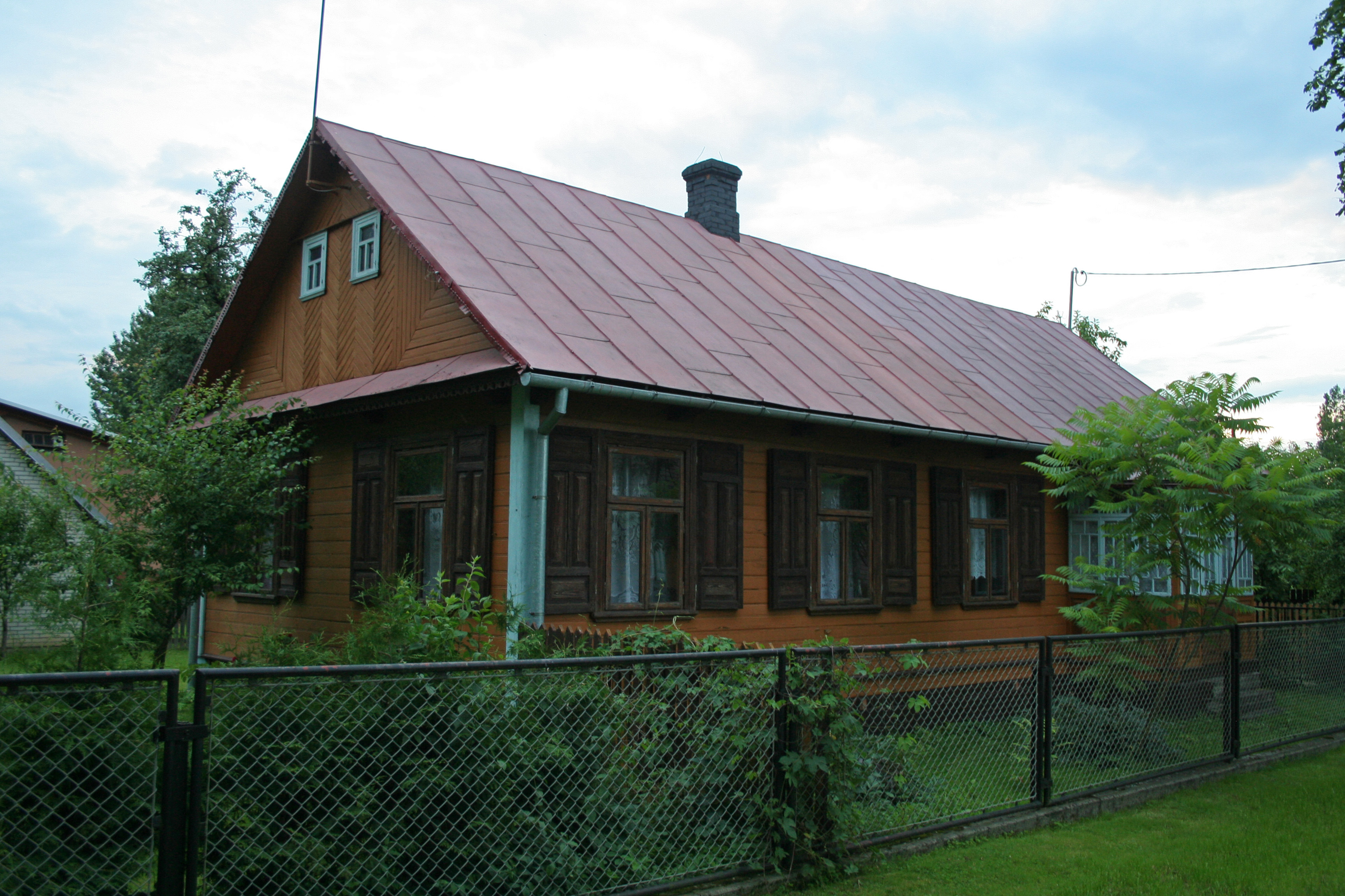 Dom w Nowokorninie.